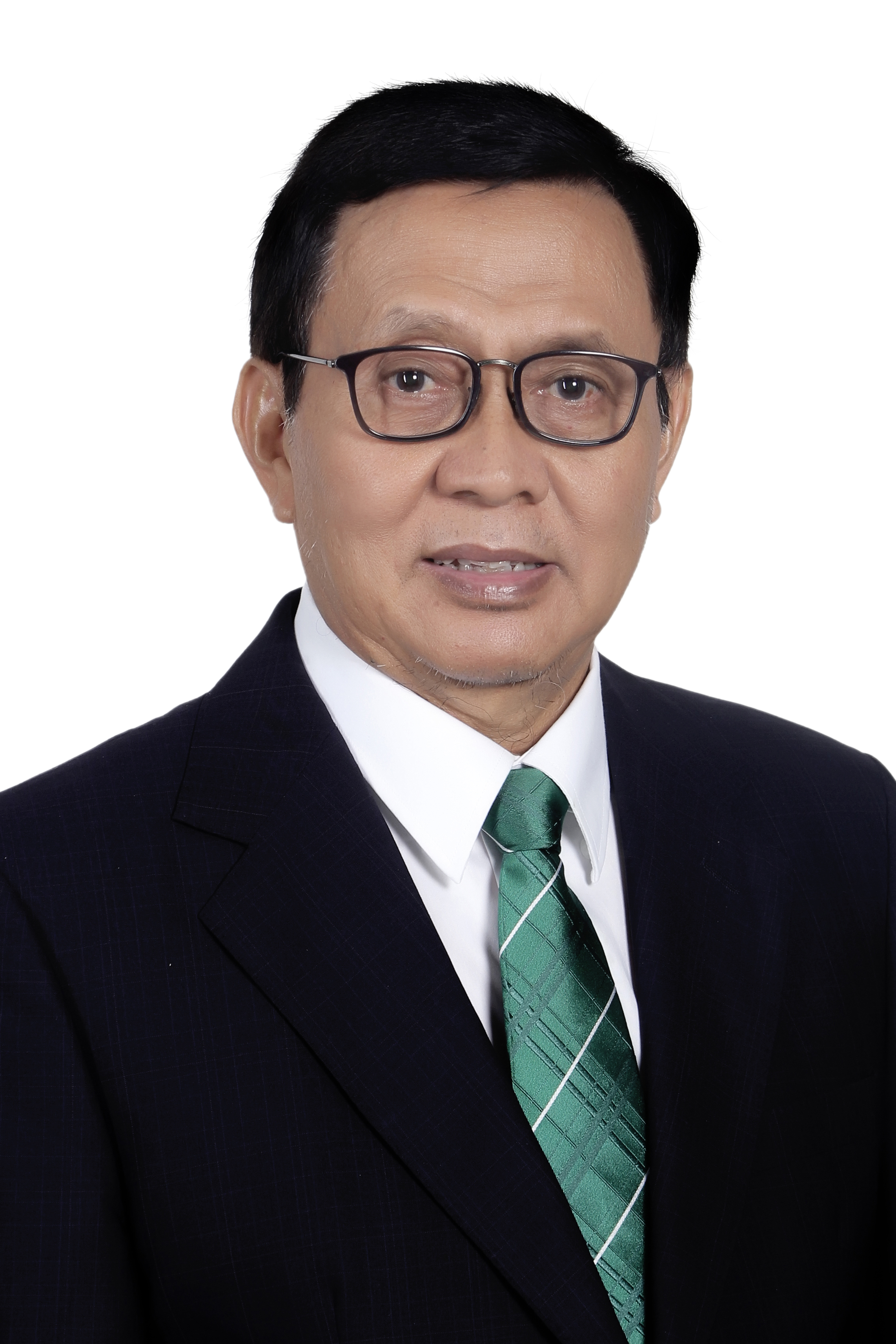 Prof. Suyanto, Ph.D., anggota Badan Standar Nasional Pendidikan Republik Indonesia periode 2019-2023.